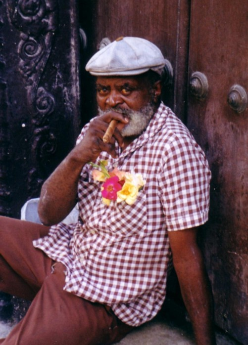 A Cuban man smoking a cigar, Habana